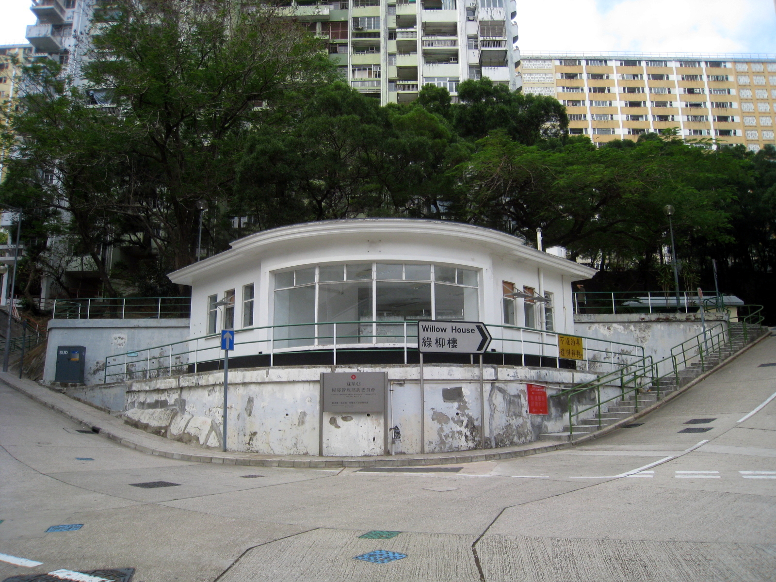 So Uk Estate 蘇屋邨